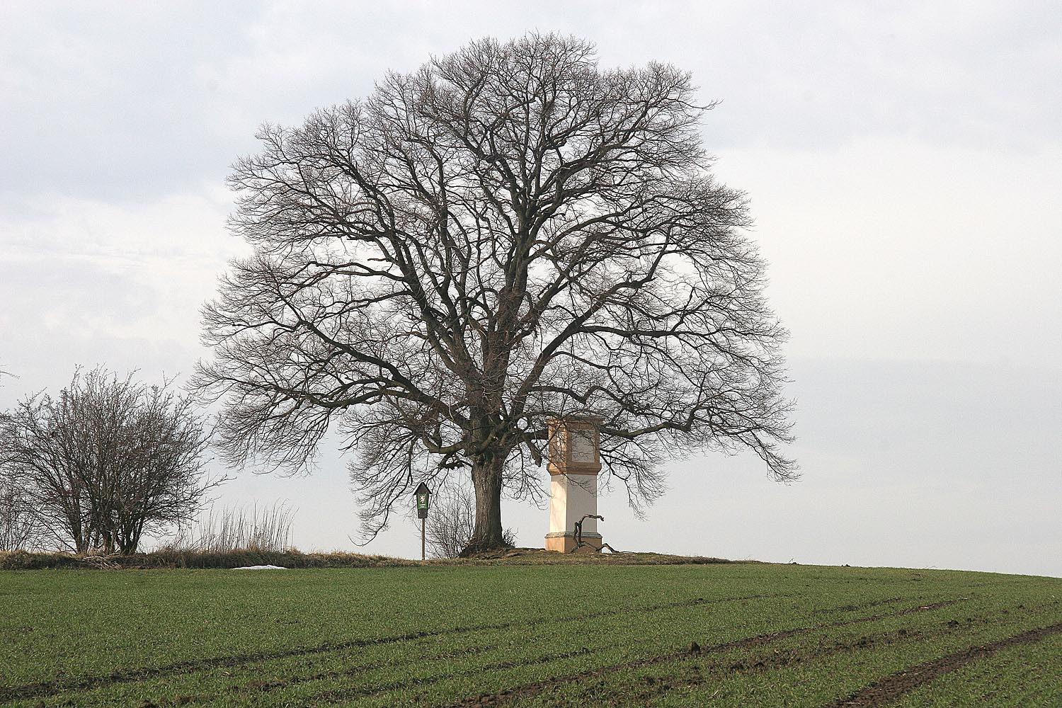 Pašinka - boží muka pod památnou lípou, district Kolín autor: Prazak date: 5. 2. 2007